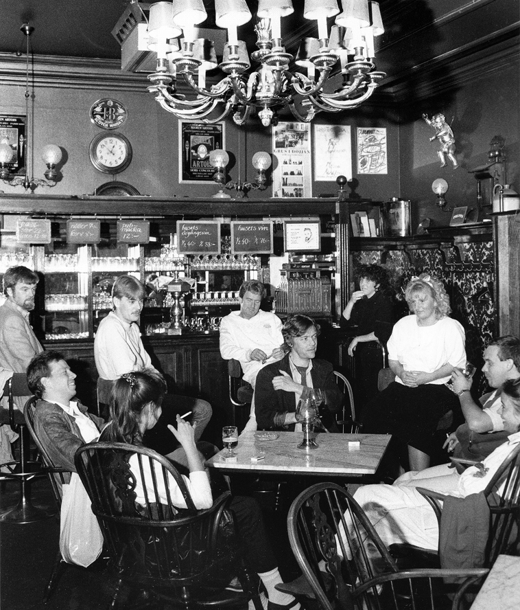 Restaurang/Pub Bulls eye "Bullen" Malmö 1986.